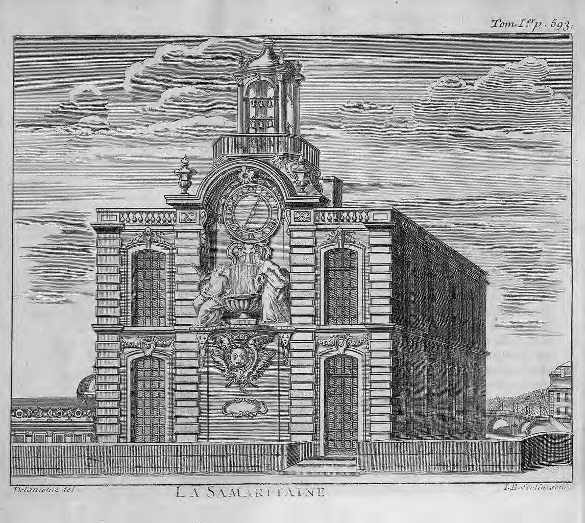 La Samaritaine, illustration de la "Description de Paris" de Jean-Aymar Piganiol de la Force